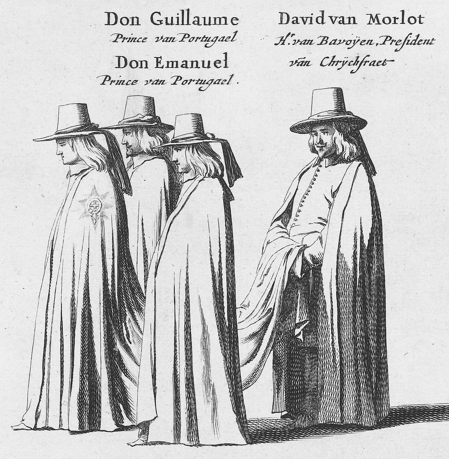 Detail van de prent uit circa 1648 genaamd "De begrafenisstoet van stadhouder Frederik Hendrik te 's-Gravenhage in 1647", welke begrafenis plaatsvond op 10 mei 1647. Plaat nr. 23 met een deel van de stoet, boven de personen staan hun naam en functie. Een strookje met de naam Frederick Wilh. opgeplakt. Onderdeel van een serie van 30 platen en 20 tekstbladen, bedoeld om aan elkaar geplakt te worden. Collectie Rijkmuseum Amsterdam.